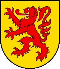 Wappen von Seiry Kanton Freiburg Schweiz